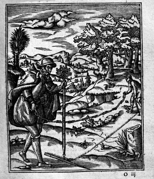 Arpenteur et son aide mesurant un champ, extrait de l'Agriculture et la Maison rustique 1583